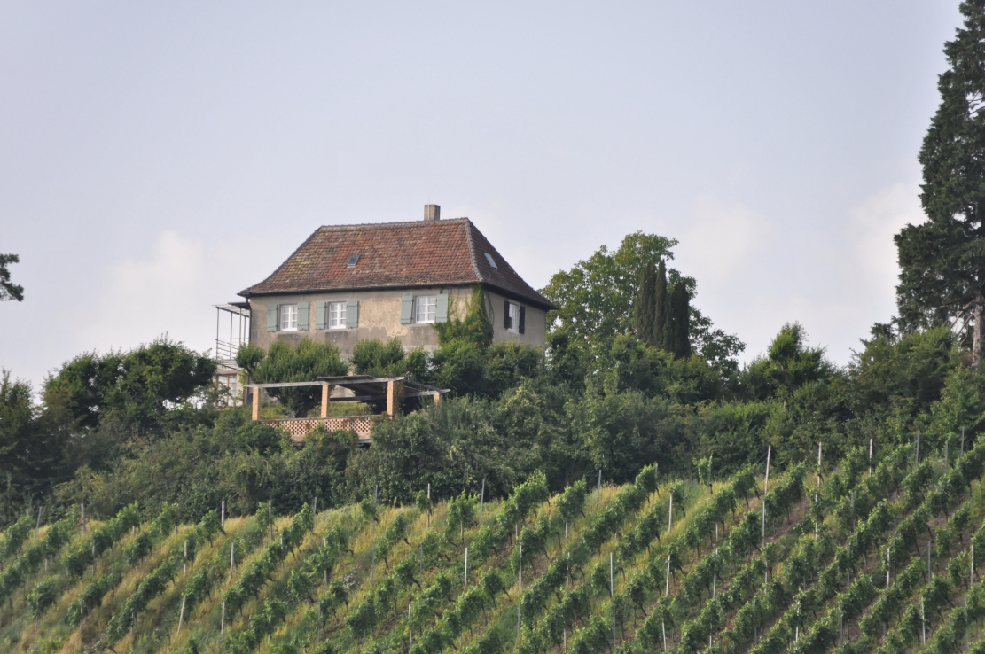 Meersburg 2012